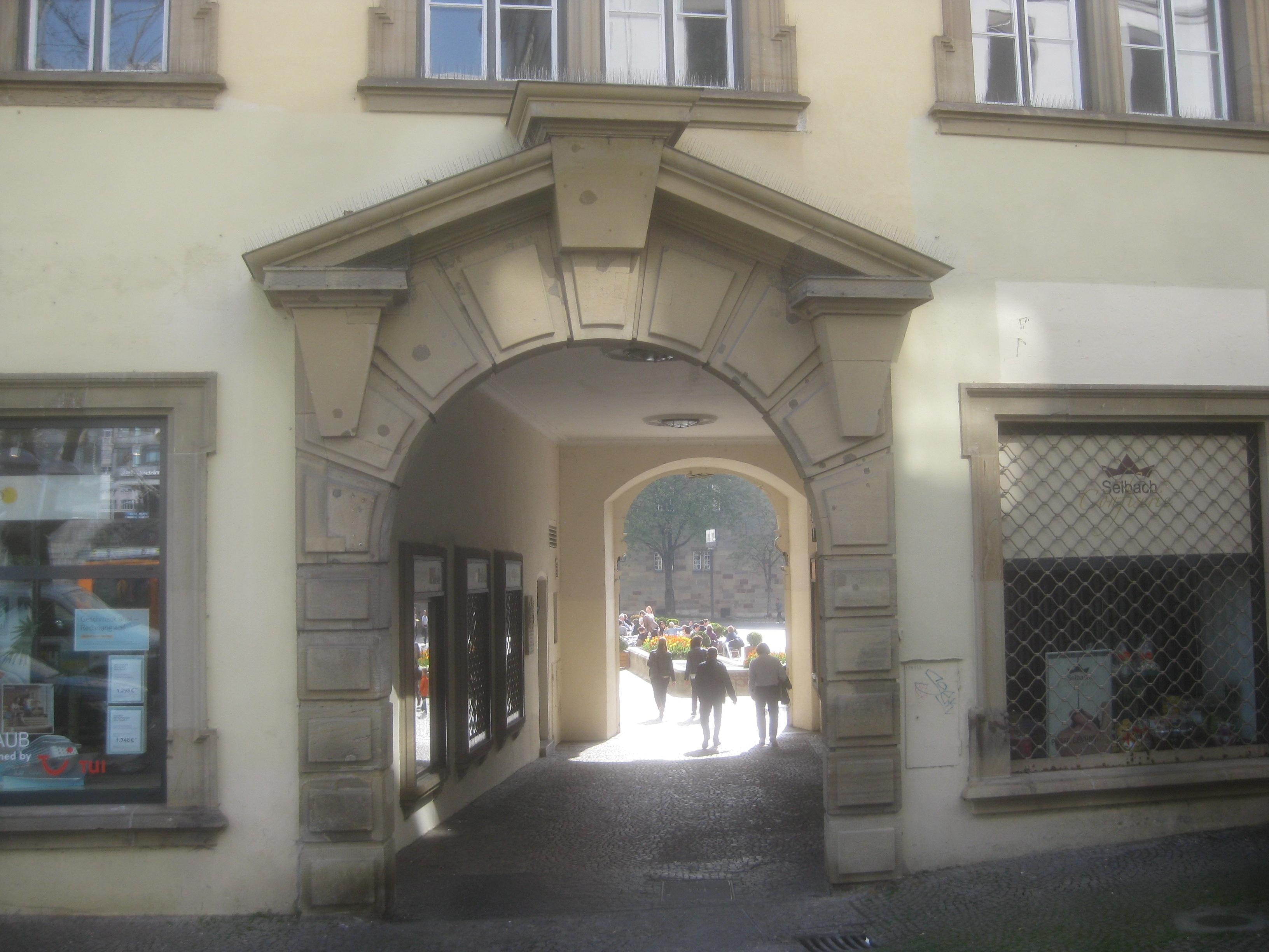 Prinzenbau in Stuttgart, Anbau mit dem Kanzleibogendurchgang, Fassade gegenüber der Commerzbank.